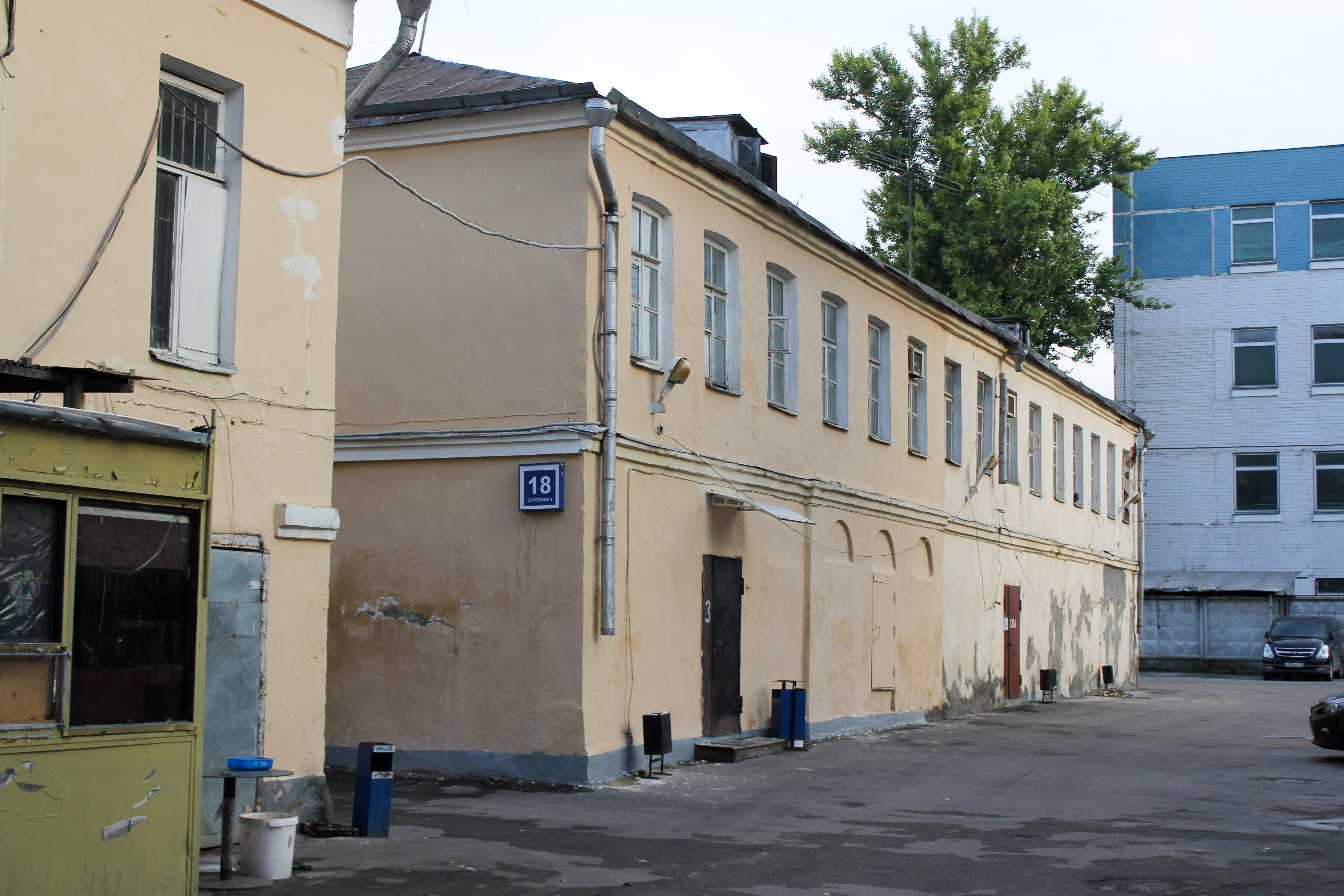 Флигель во дворе: Кожевническая ул., дом 18, строение 2, Даниловский, Южный округ, Москва